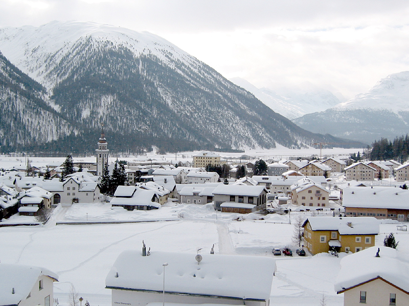 Bever GR (Blick nach Süden Richtung Flugplatz Samedan und Bernina-Pass; links im Hintergrund der Muottas Muragl)